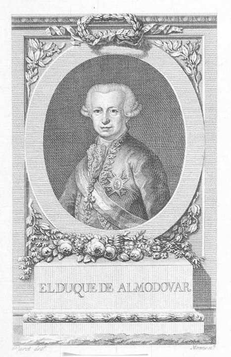 Pedro Francisco Luján y Góngora, duque de Almodóvar. Ilustración de Historia política de los establecimientos ultramarinos de las naciones europeas, por Eduardo Malo de Luque. Madrid, 1784. Grabado de Juan Moreno de Tejada por dibujo de Luis Paret y Alcázar. Biblioteca Nacional de España